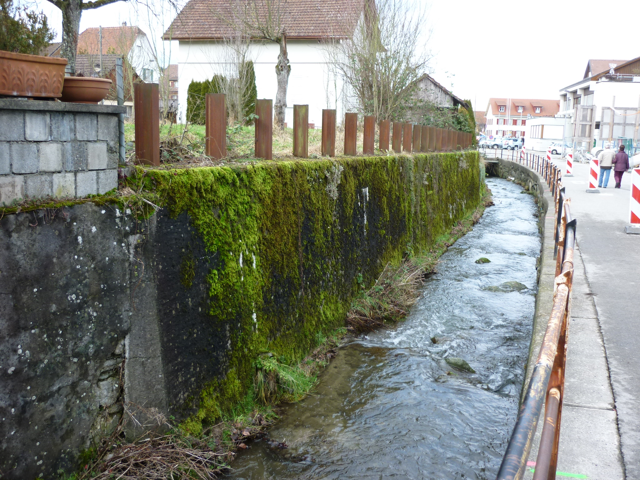 Sperrstelle Urdorf ZH, Schweiz